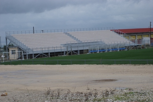 Andreas Kanistras Groud Patra Greece Γήπεδο ΕΠΣ Αχαΐας Ανδρέας Κάνιστρας